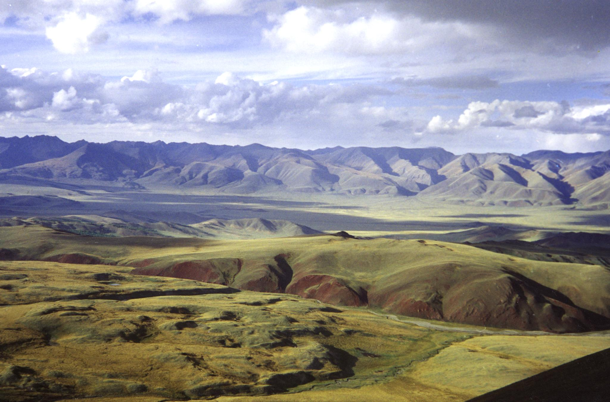 Убсунурская котловина, Монгун-Тайгинский кожуун This image is related to the protected area of Russia number 1700025